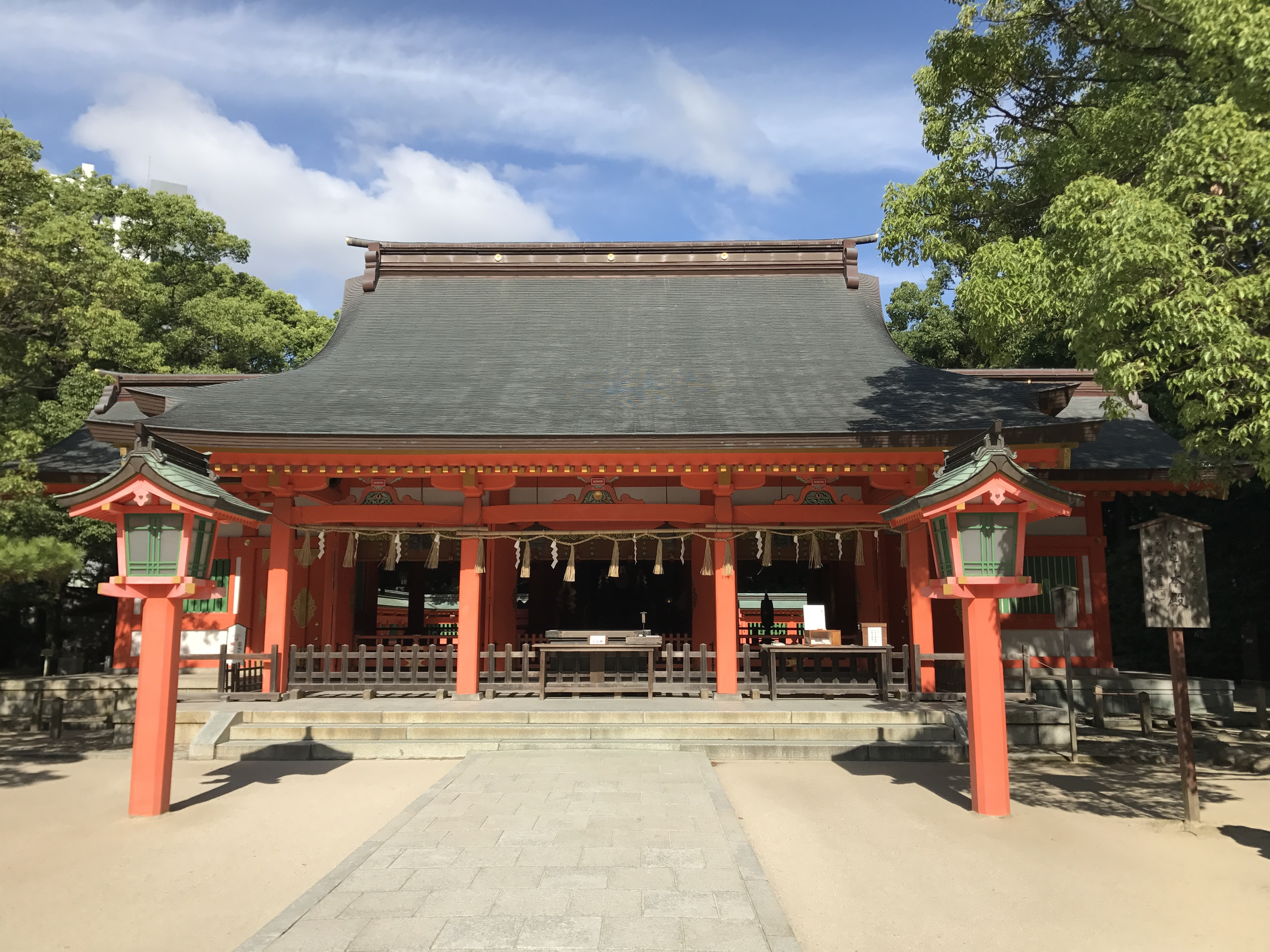 住吉神社の拝殿